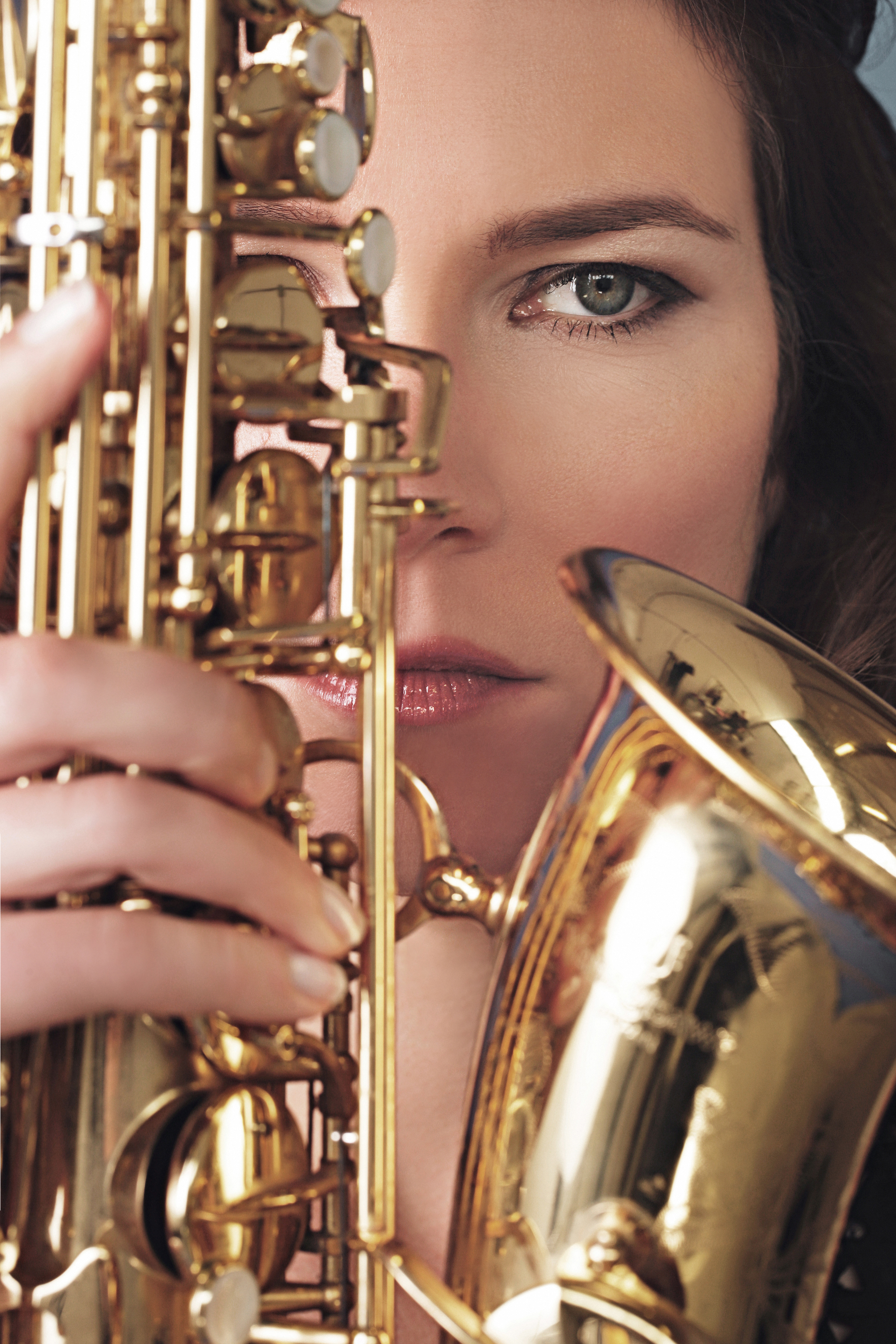 Coverfoto voor het in 2016 verschenen album Saxify. Fotograaf: Michel Zoeter. Rechtenvrije foto.